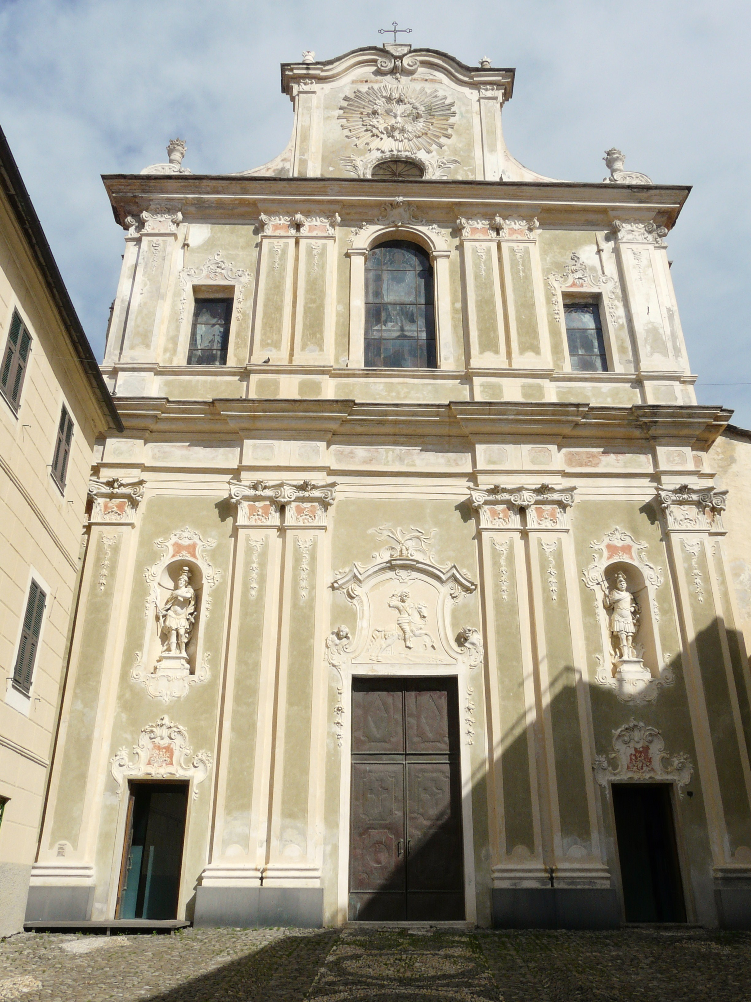 Chiesa di San Maurizio di Riva Ligure, Liguria, Italia